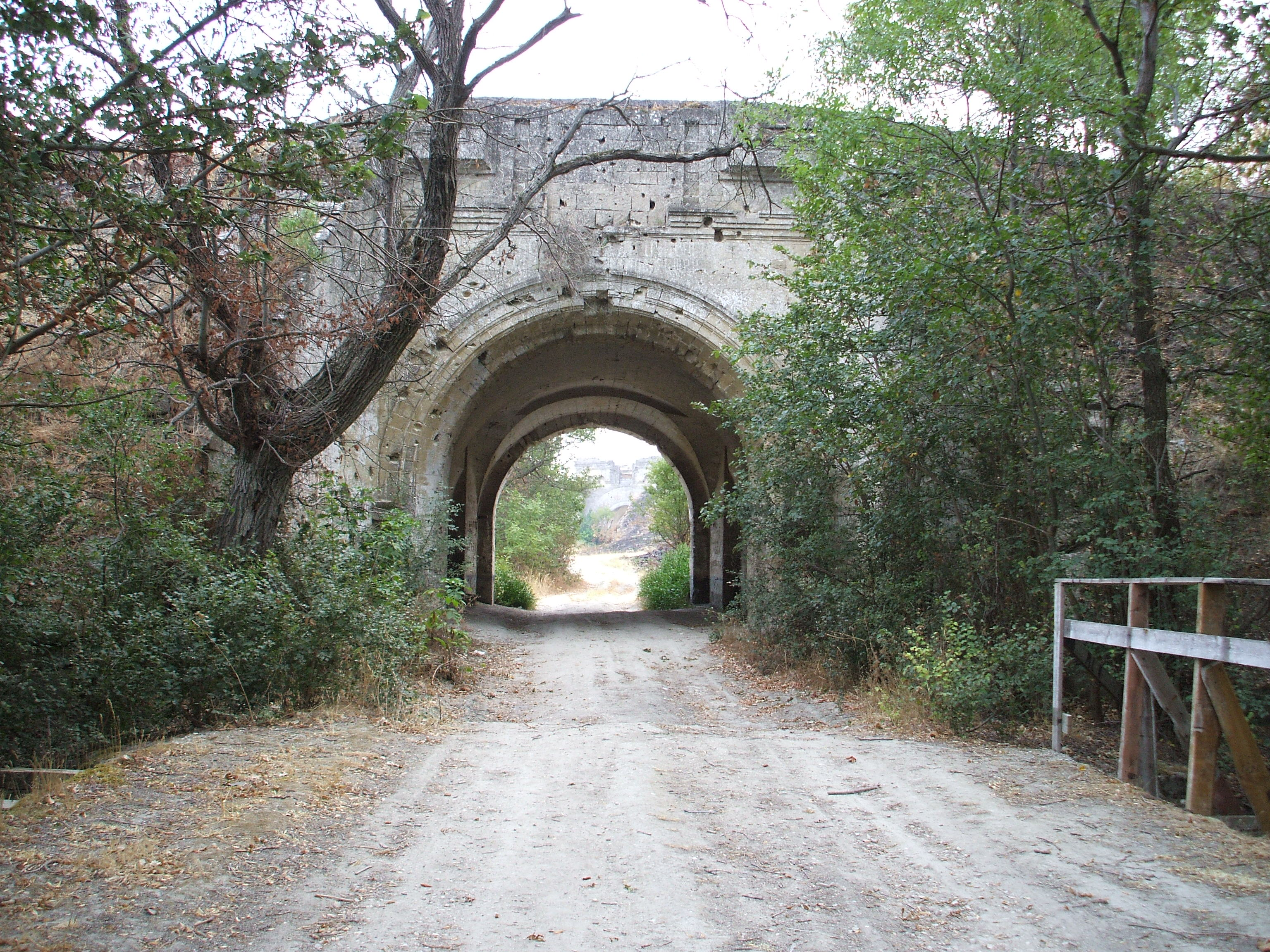 Северные ворота крепости Керчь